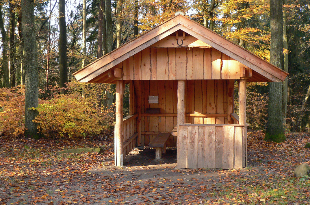 Schutzhütte auf dem Hohen Mechtin